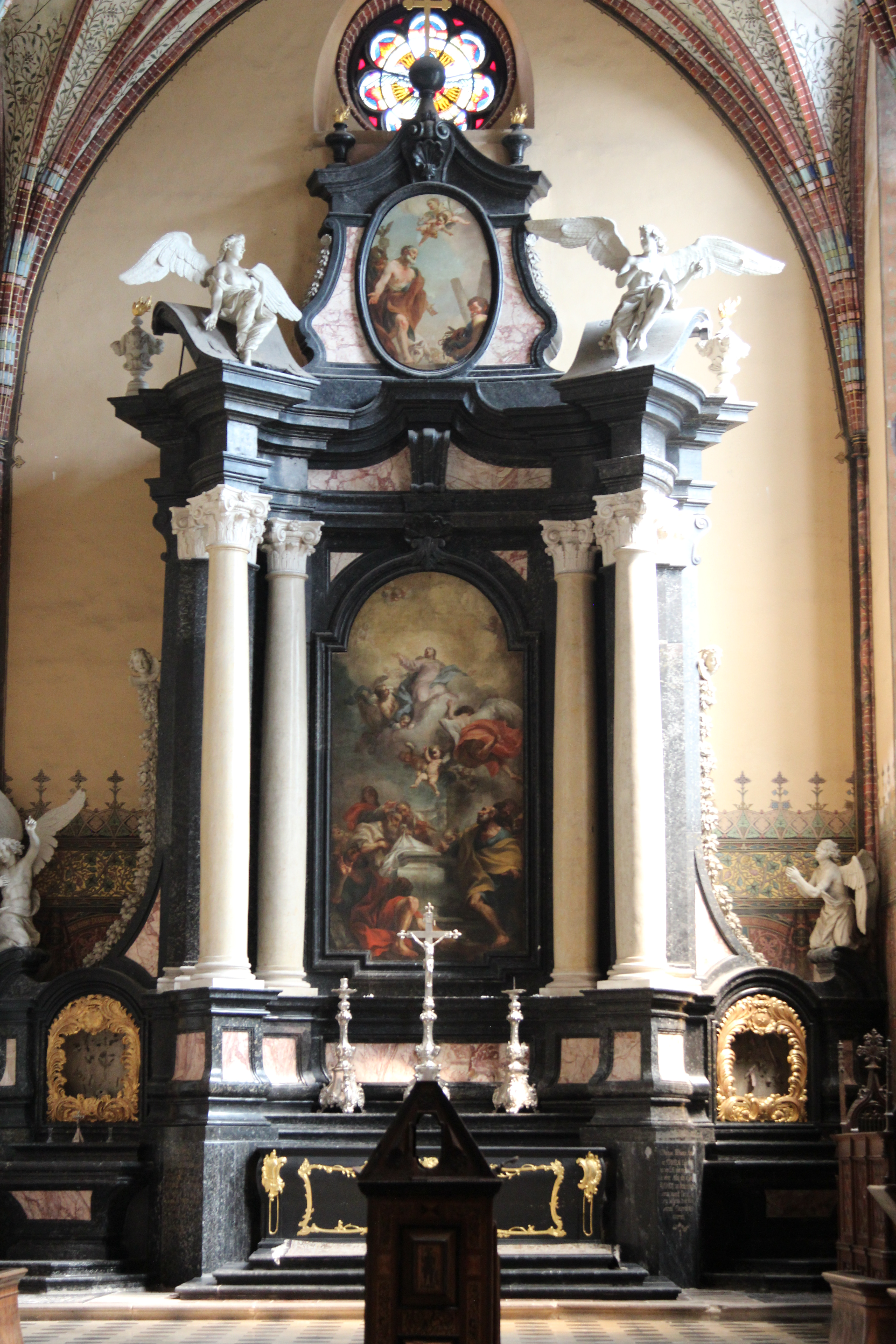 Frombork, katedra pw. Wniebowzięcia NMP i św. Andrzeja, 1329-1388, 1 poł. XVIII